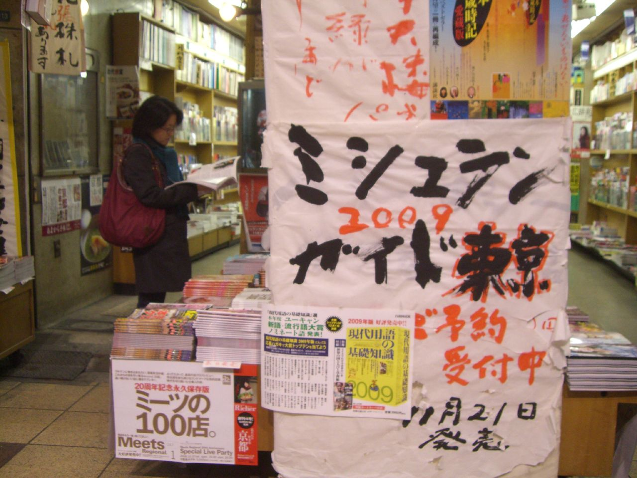 @難波 現代用語の基礎知識